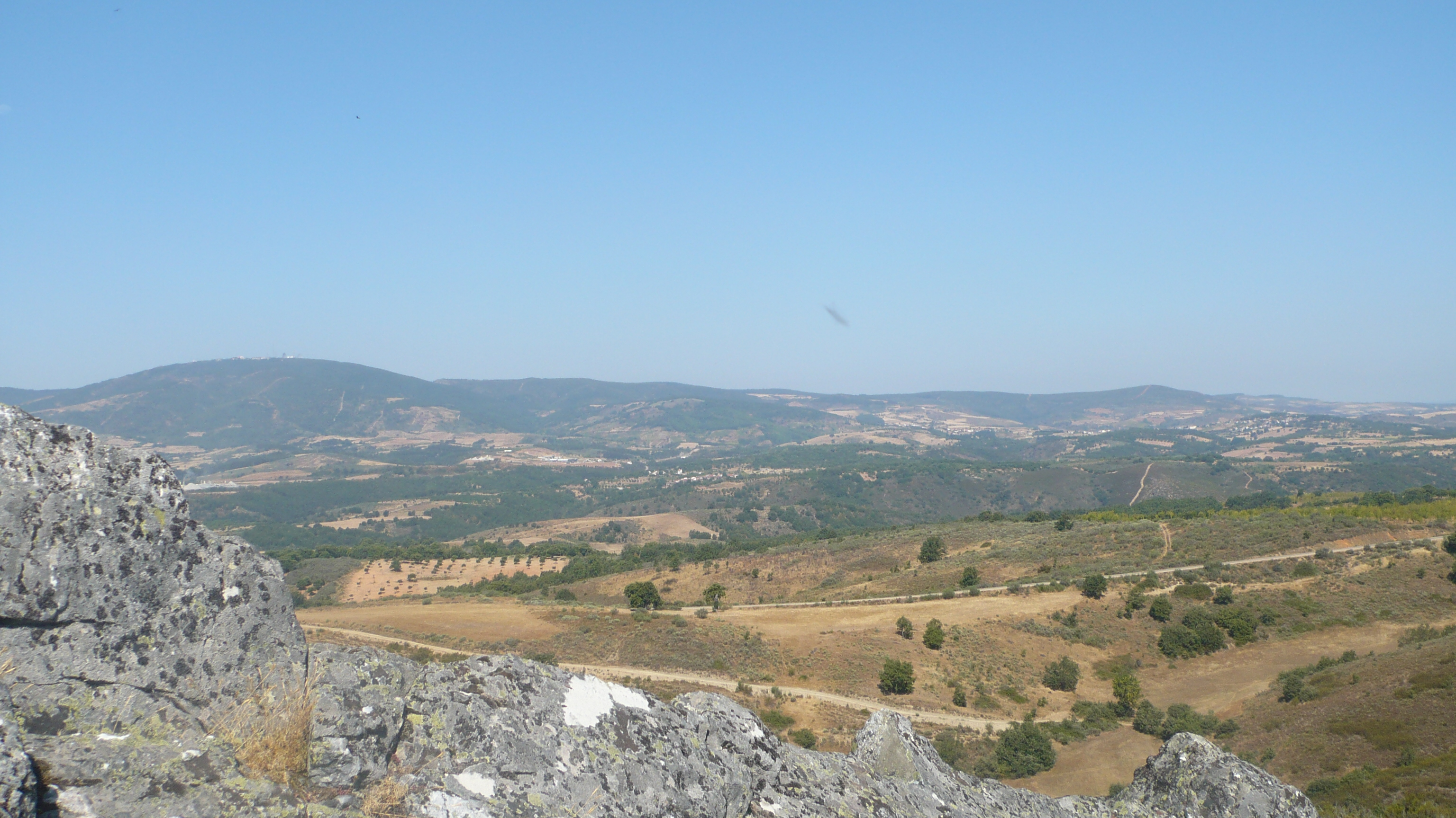 Topo em direcção ao noroeste com vista para a Serra da Nogueira (esquerda fundo). Pica Porcos, Paredes, Parada, Bragança, Portugal.